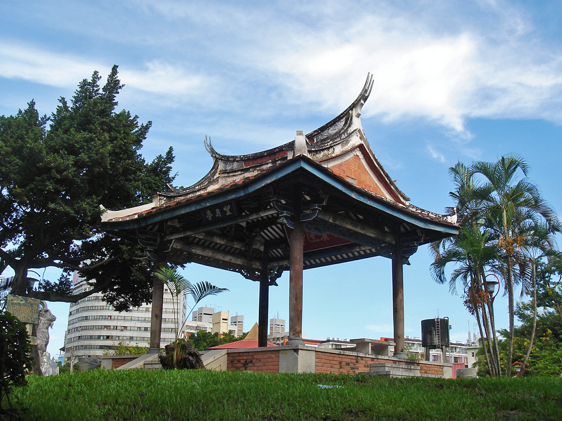 臺灣省城北門門樓。